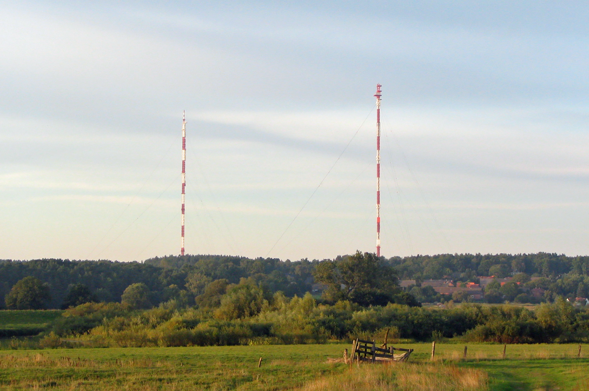 Höhbeck mit Sendemasten von Süden aufgenommen